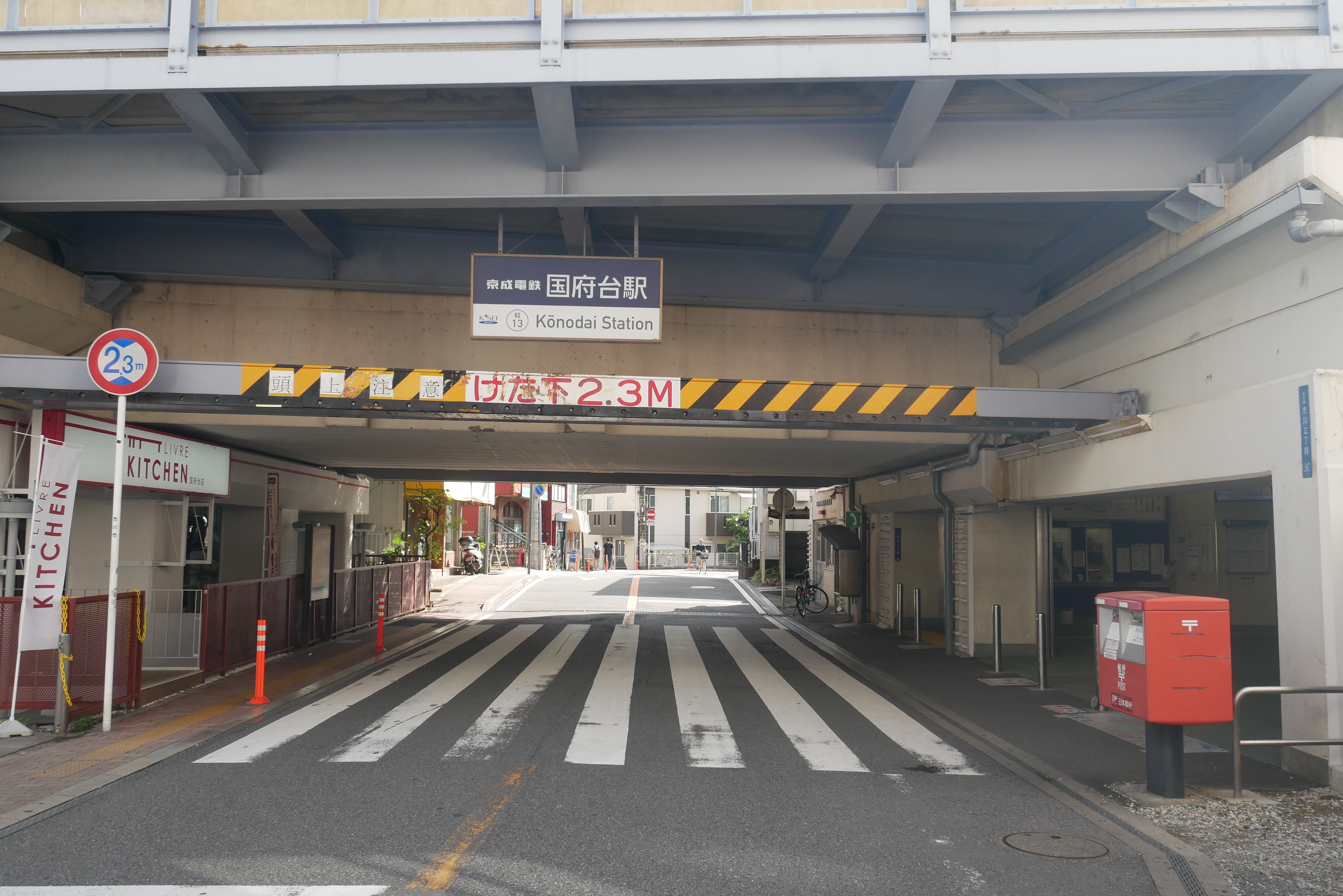 国府台駅 (Konodai Station)